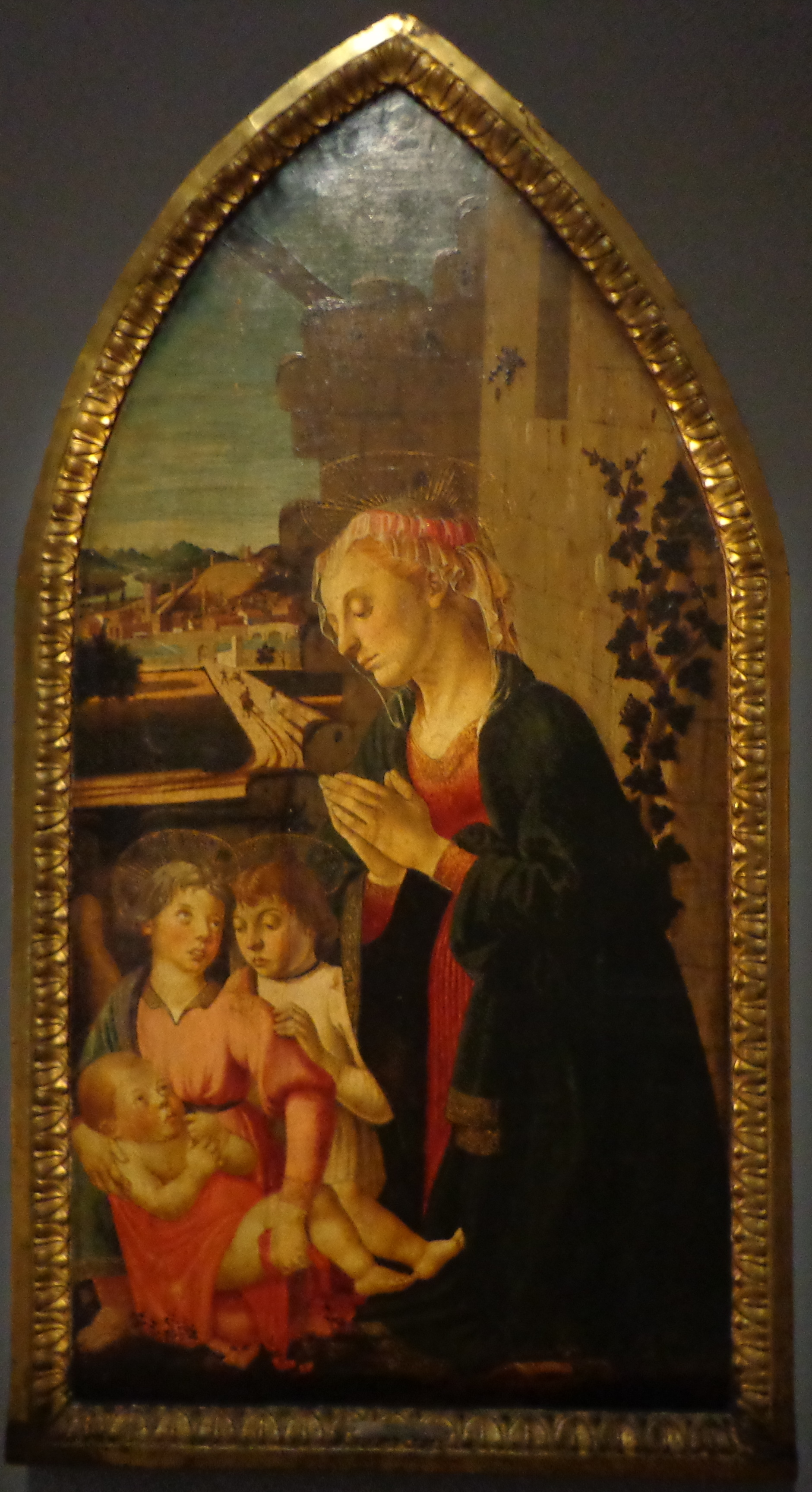 Vierge à l'Enfant Strasbourg